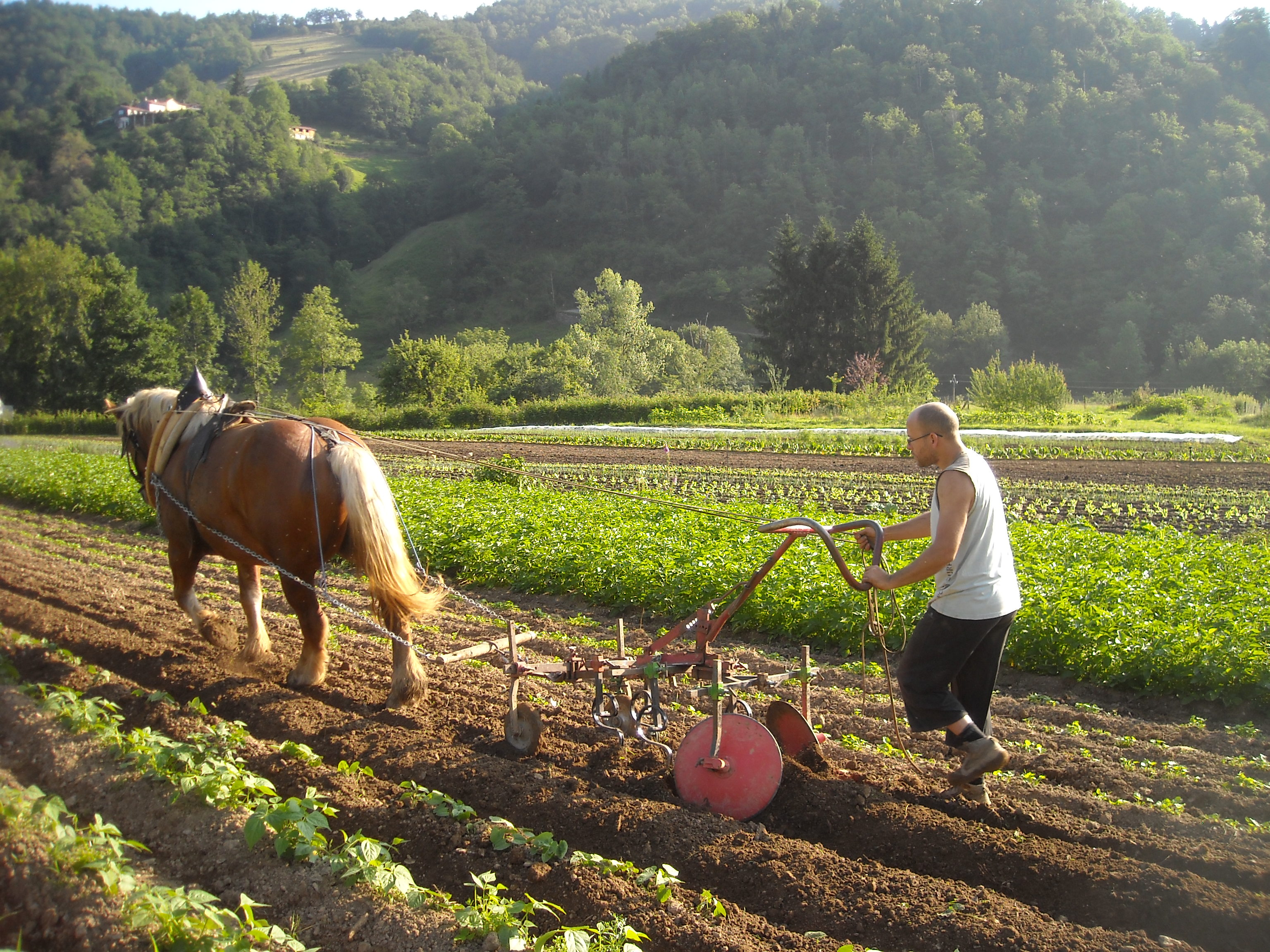 Réalisation de buttes en traction hippomobile à l'aide du porte-outils Kassine de l'association PROMMATA.